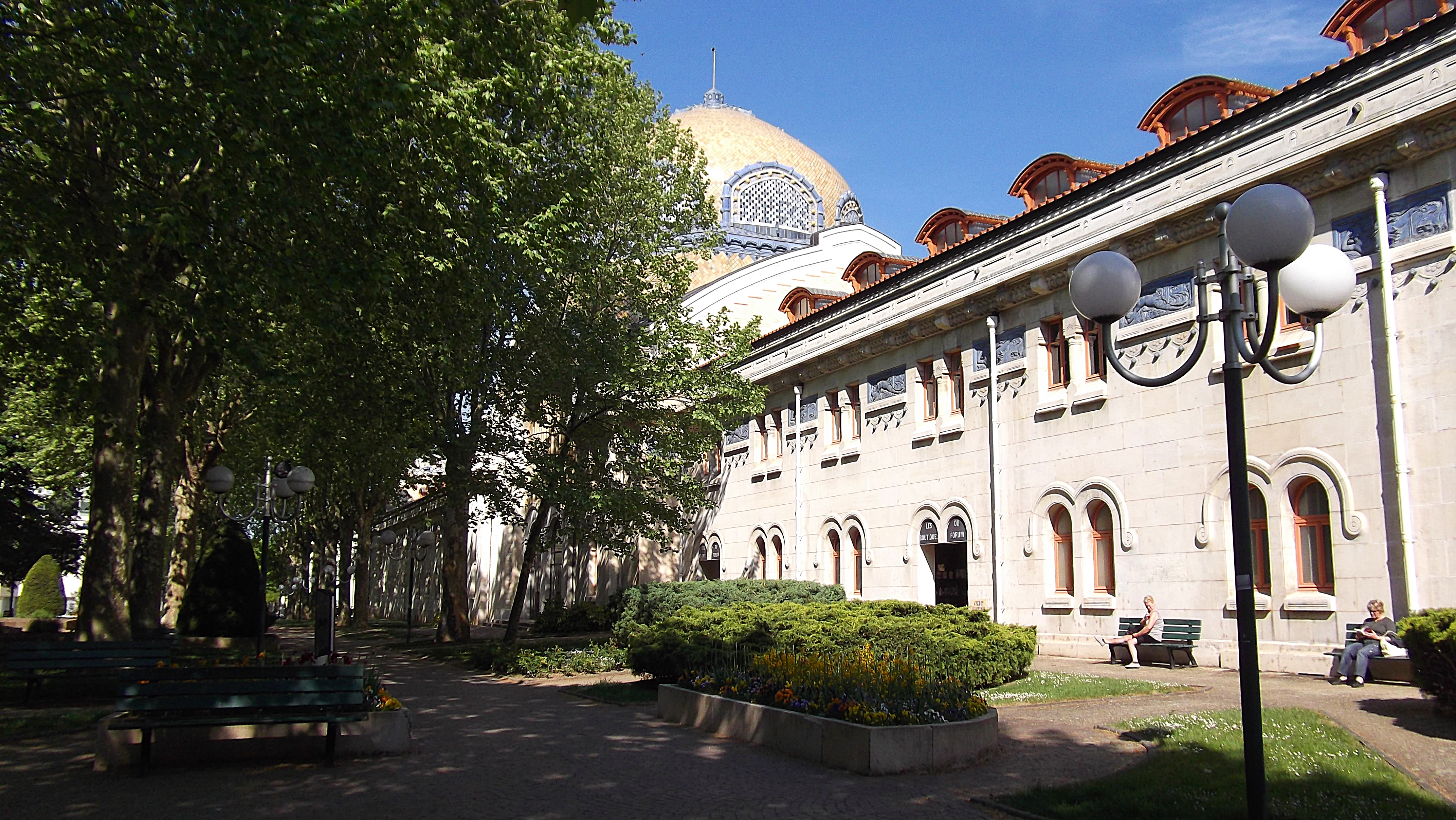 Centre des Dômes de Vichy.